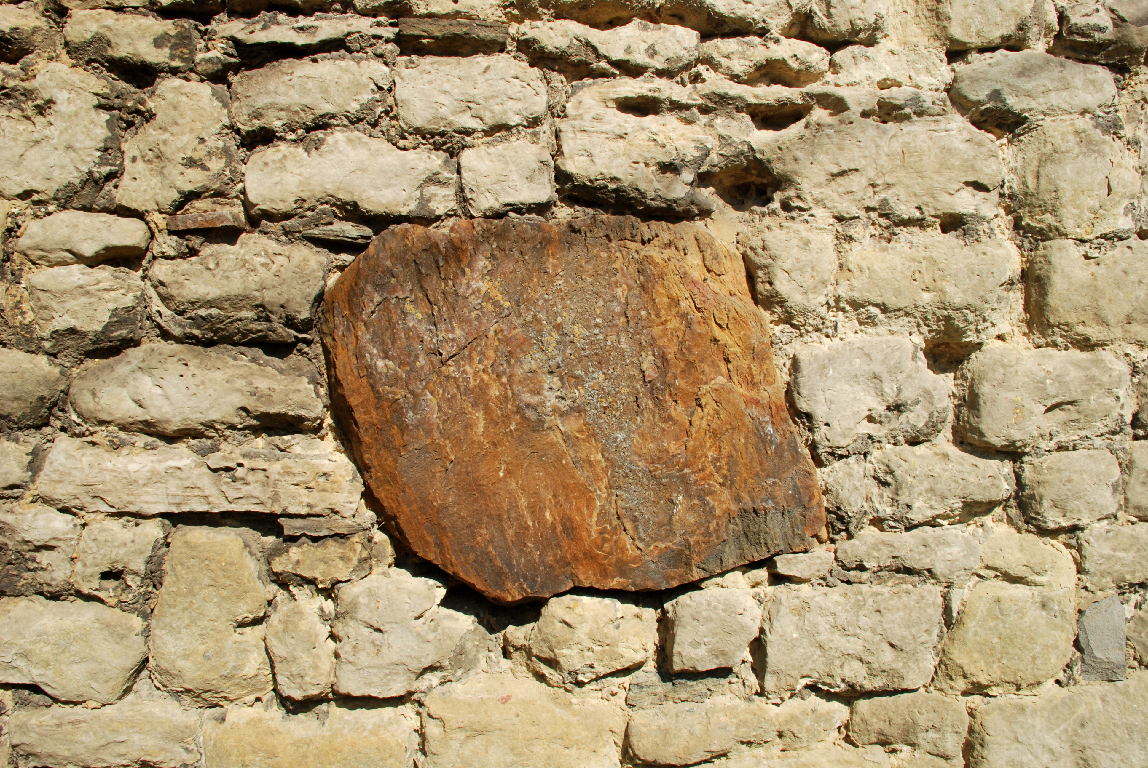 Belgique - Brabant wallon - Mont-Saint-Guibert - Corbais - Tour Griffon du Bois (donjon de Corbais, 13e siècle)